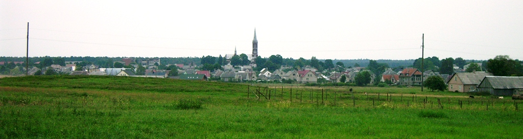 Šilalė